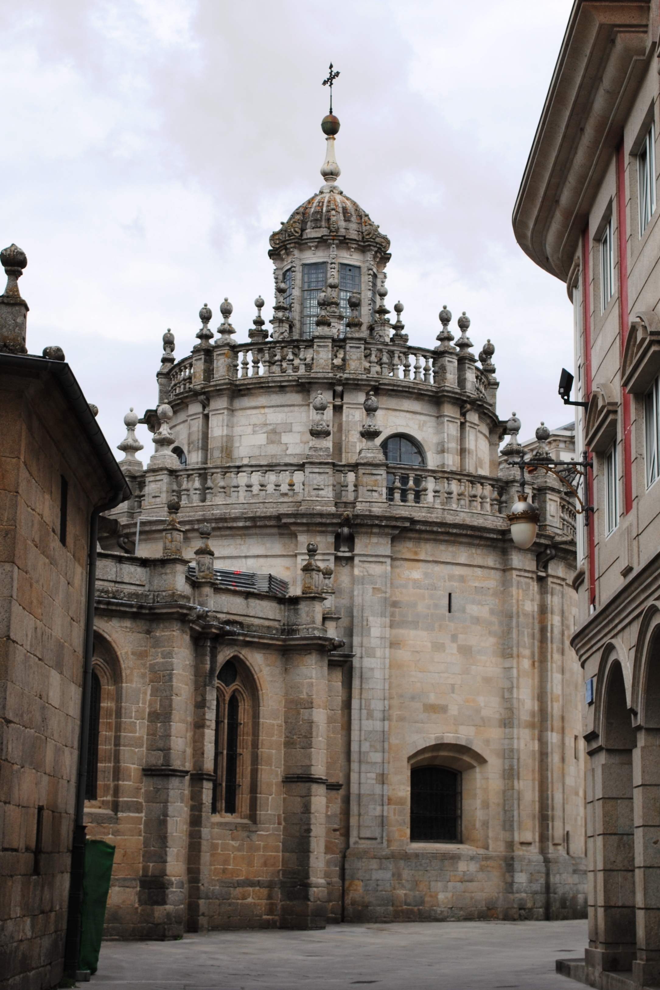 Lugo, Catedral, ábsida